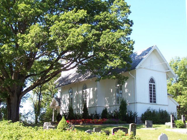 Oppegård kirke i Oppegård kommune, Akershus, Norway